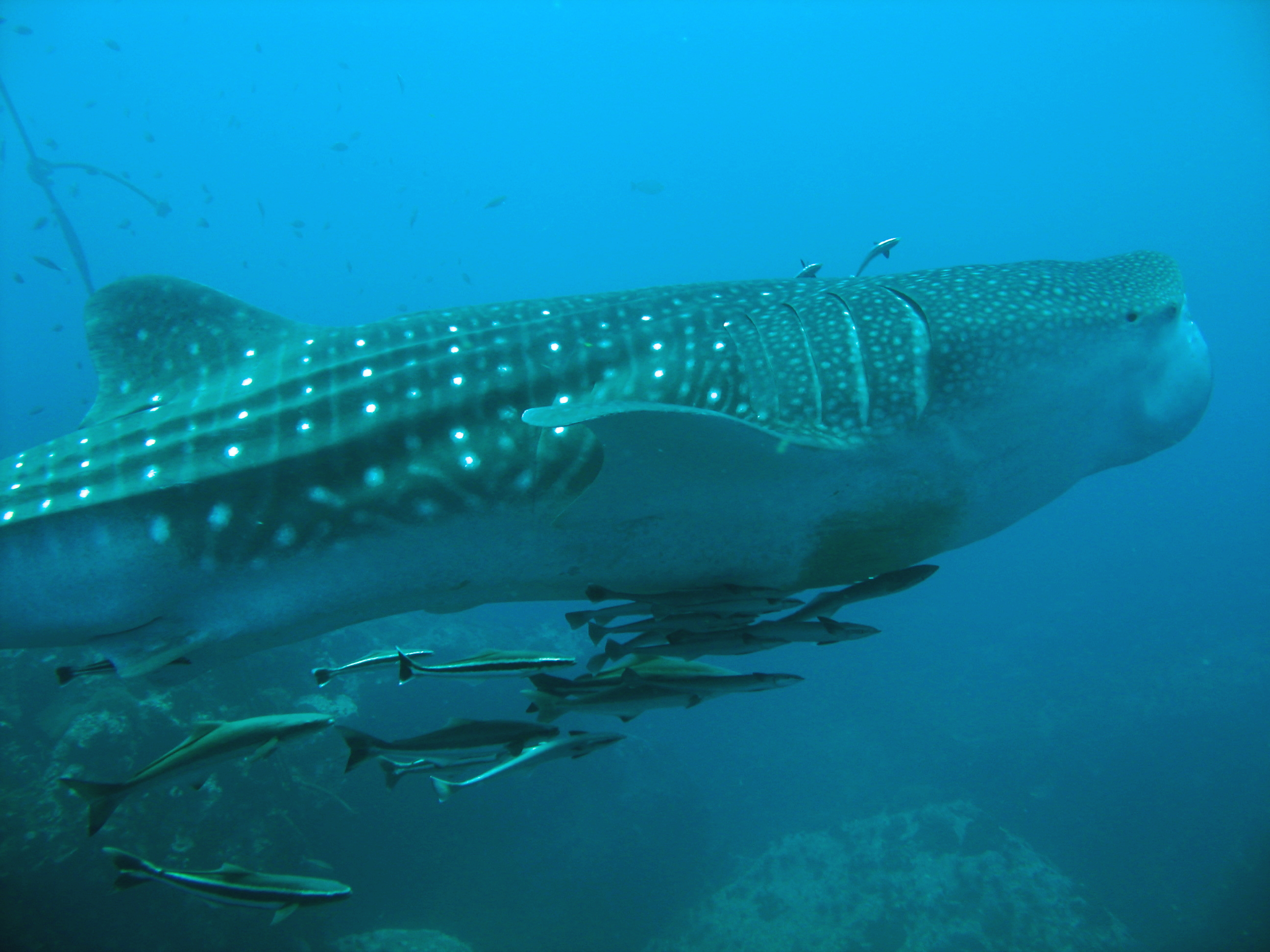 Whaleshark